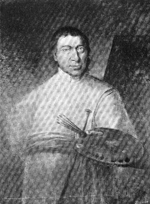 František Kristián Ezechiel Nosecký (1693 - 1753), Český římskokatolický duchovní, strahovský premonstrát a barokní malíř.